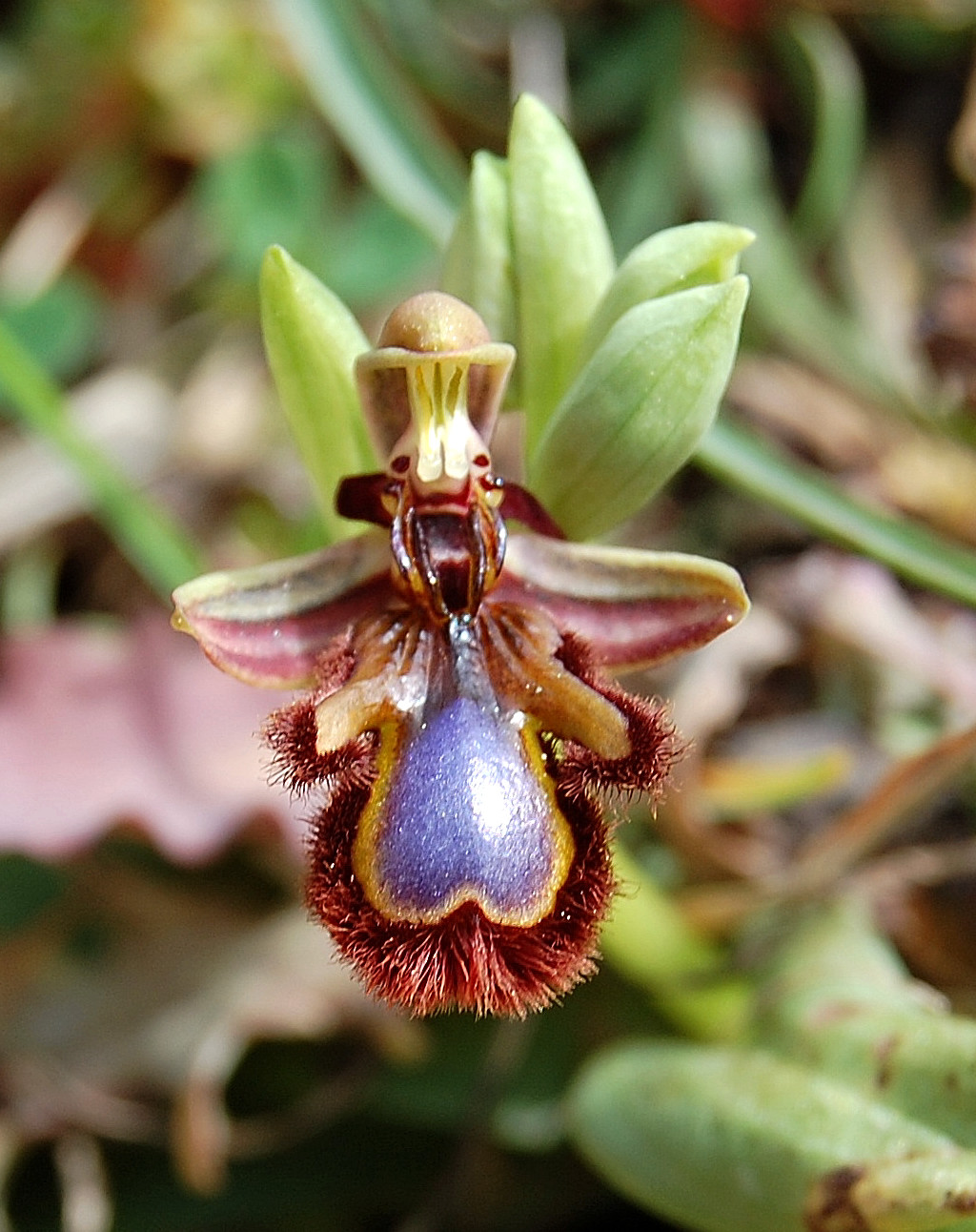 Orchidee dello Zingaro Ophrys ciliata